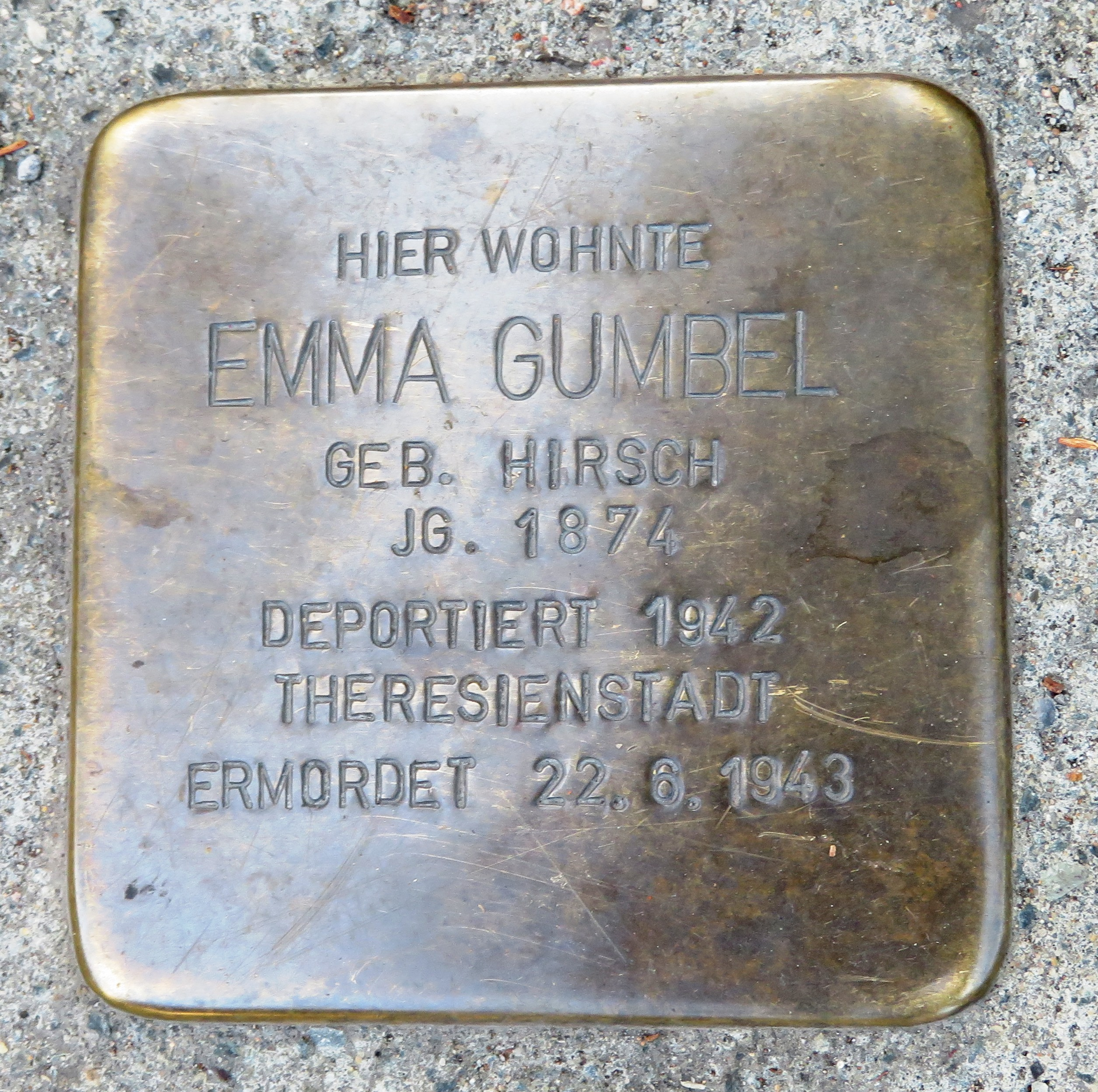 Stolperstein in Heilbronn